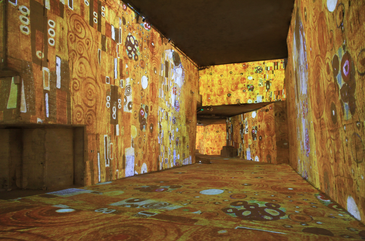 Exposition produite par Culturespaces et réalisée par Gianfranco Iannuzzi, Renato Gatto et Massimiliano Siccardi